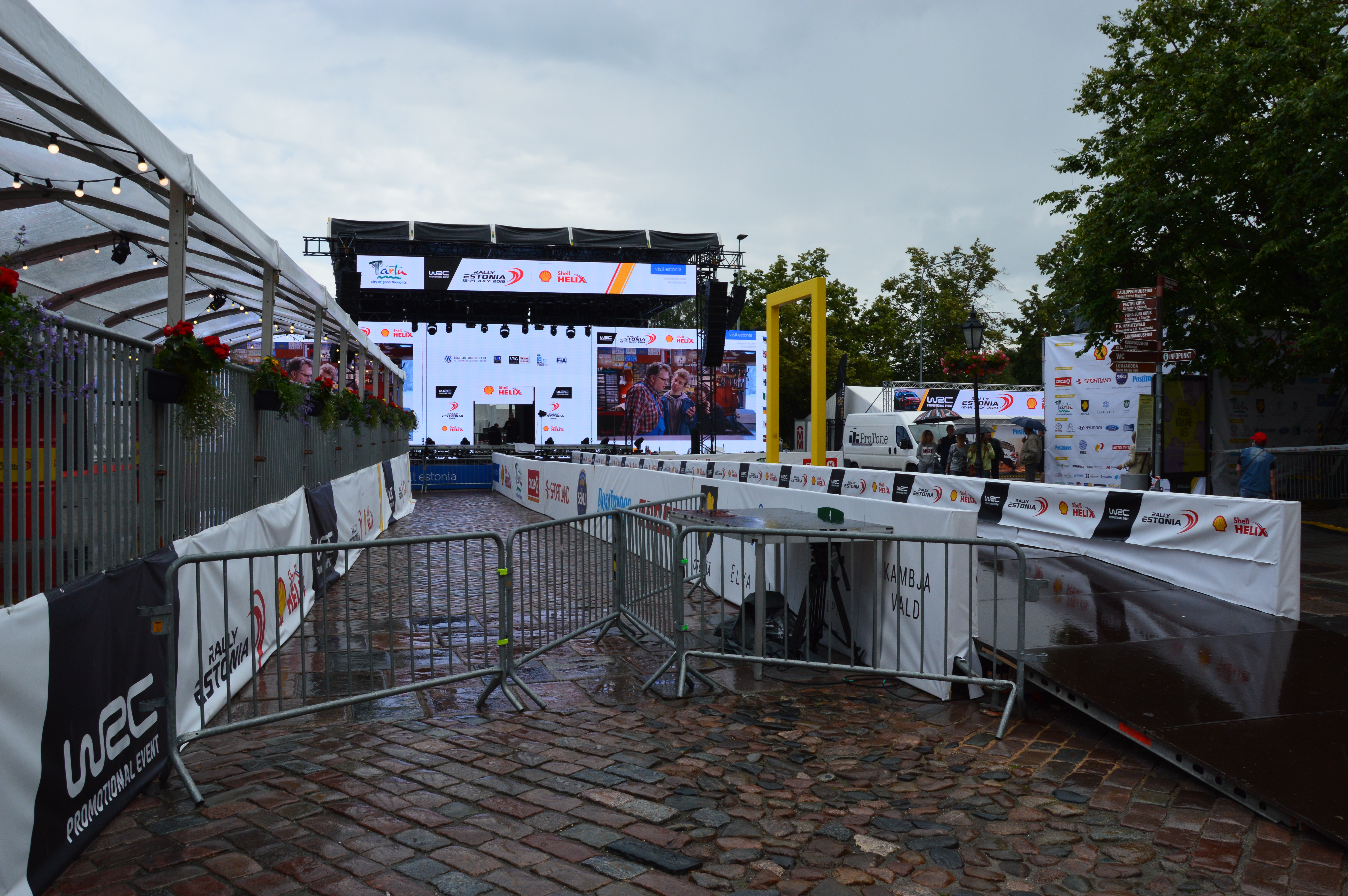 Rally Estonia 2019. Tartu poodium enne ralli viimase katse algust.